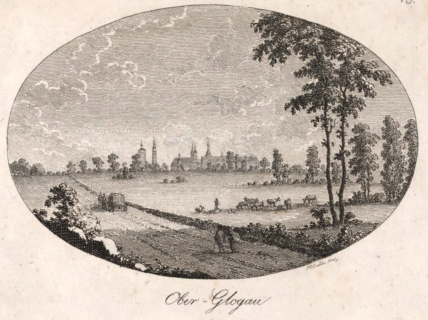 Ansicht der Stadt Oberglogau in Oberschlesien.